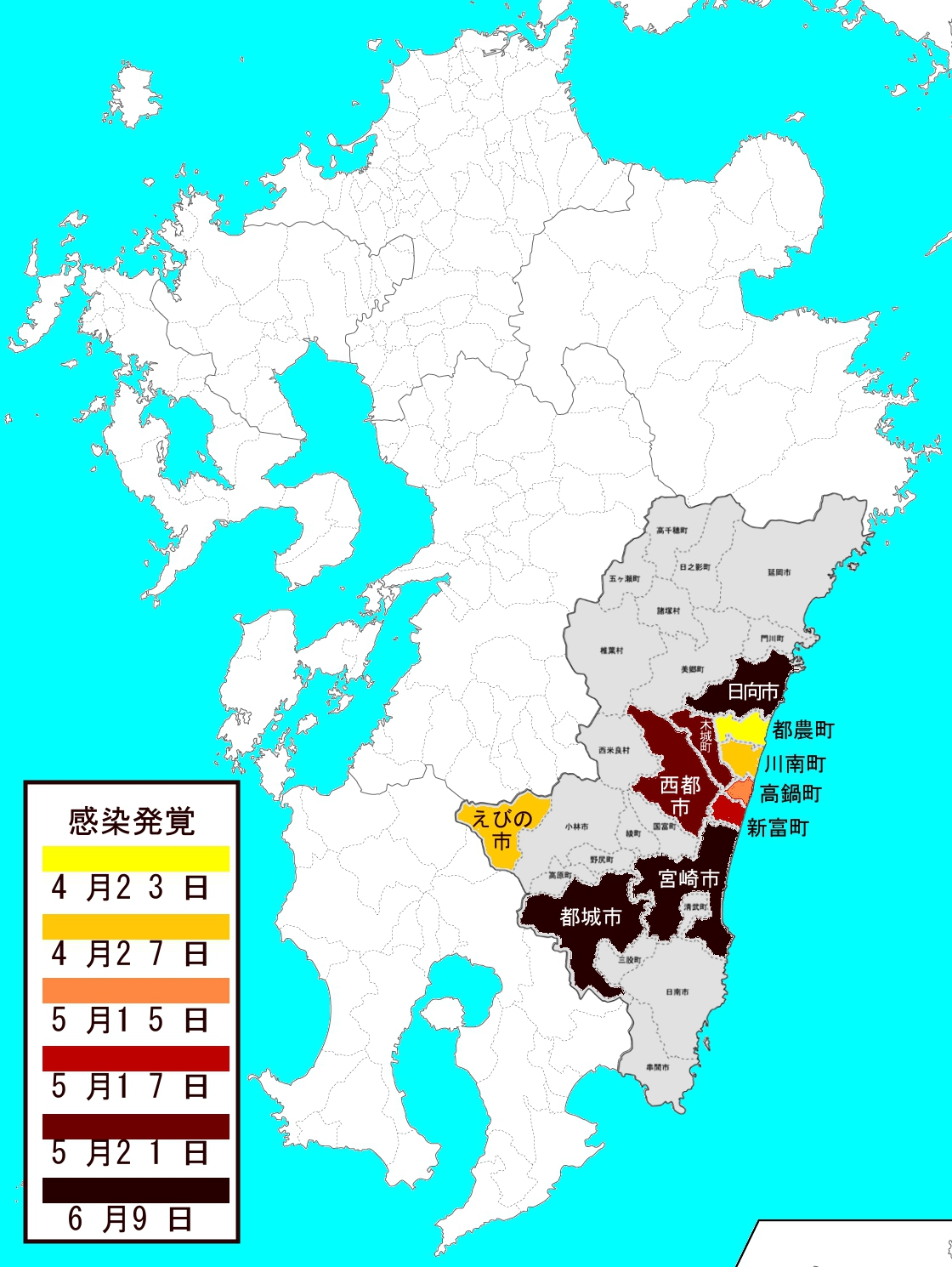 日本の宮崎県の口蹄疫の発生地域の地図です。